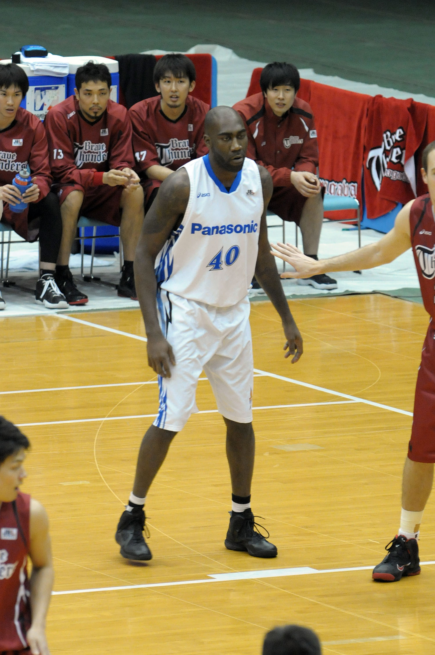 パナソニックトライアンズ、ジャミール・ワトキンス選手。とどろきアリーナで。